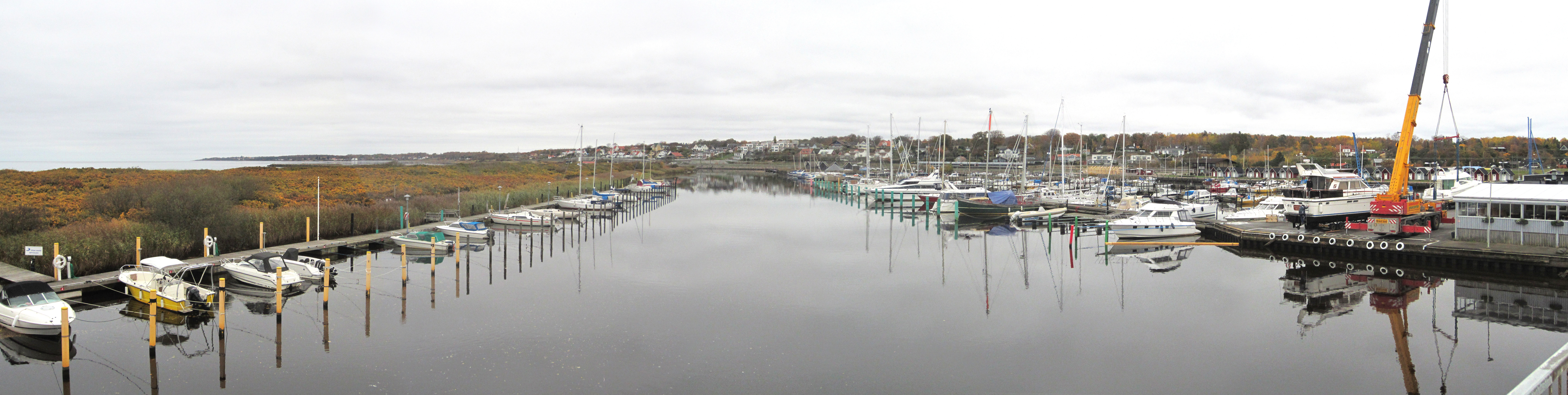 Rönneås utlopp vid Skälderviken, Sweden.